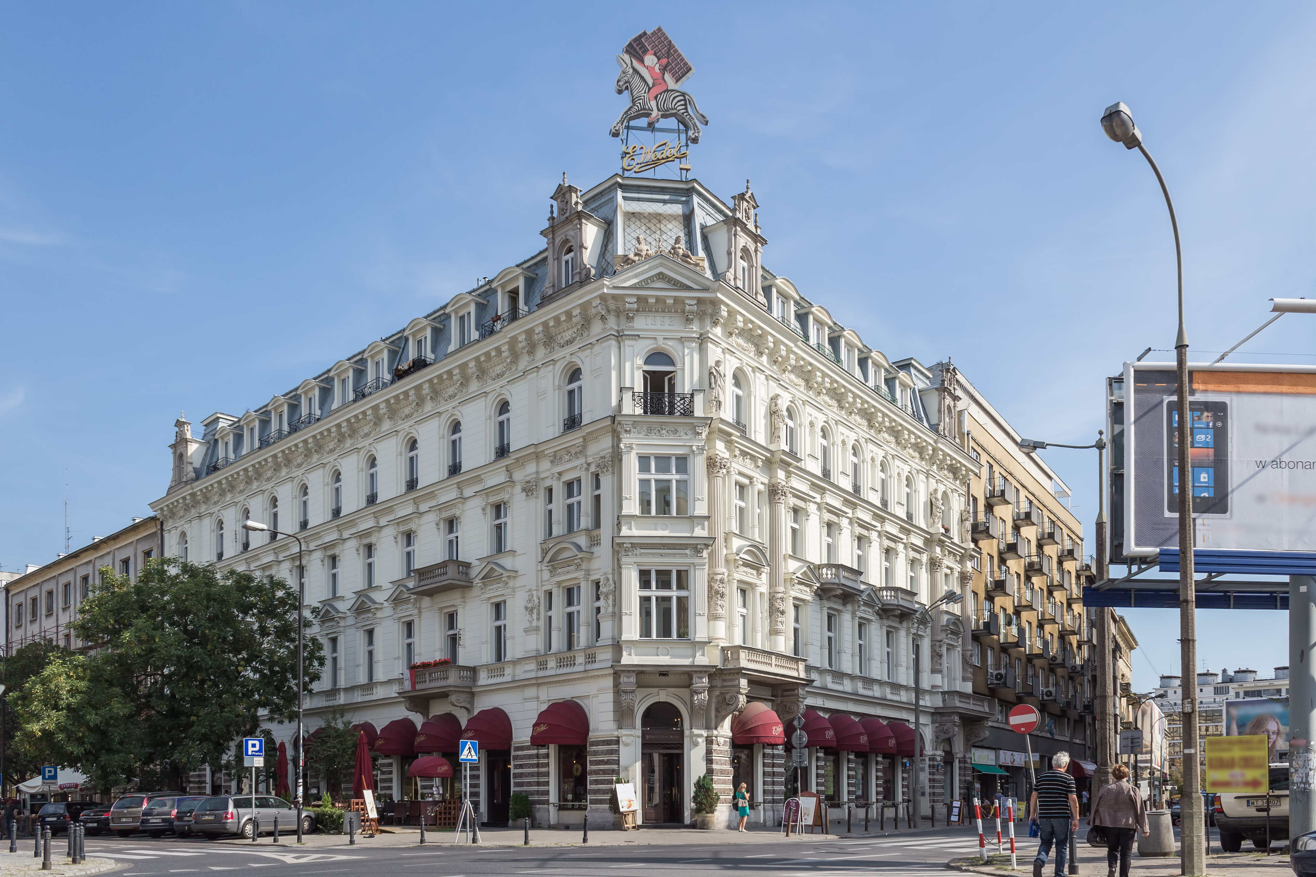 Kamienica Emila Wedla w Warszawie - kamienica zbudowana w 1893 roku przy skrzyżowaniu ulic Szpitalnej oraz Górskiego na warszawskim Śródmieściu.